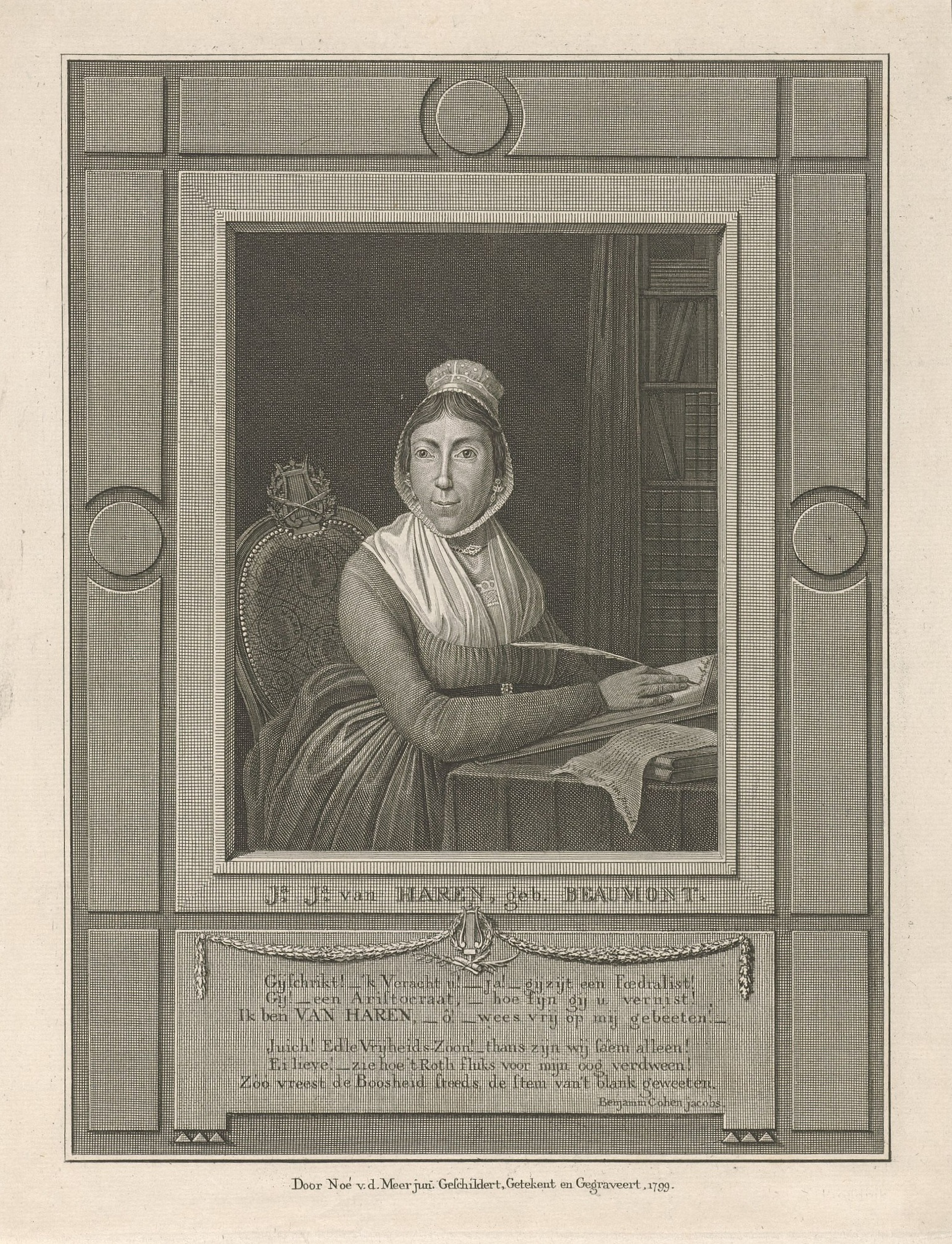 IdentificatieTitel(s): Portret van Johanna Jacoba van BeaumontObjecttype: prent Objectnummer: RP-P-OB-23.467Catalogusreferentie: FMP 2161-aOpschriften / Merken: verzamelaarsmerk, verso, gestempeld: Lugt 2228Omschrijving: Portret van Johanna Jacoba van Beaumont, patriotgezind schrijfster, schrijvende aan een tafel.VervaardigingVervaardiger: prentmaker: Noach van der Meer (II) (vermeld op object)naar eigen ontwerp van: Noach van der Meer (II) (vermeld op object)naar schilderij van: Noach van der Meer (II) (vermeld op object)schrijver: Benjamin Cohen Jacobs (vermeld op object)Plaats vervaardiging: AmsterdamDatering: 1799Fysieke kenmerken: ets en gravureMateriaal: papier Techniek: etsen / graveren (drukprocedé)Afmetingen: plaatrand: h 278 mm × b 217 mmOnderwerpWat: writing toolsWie: Johanna Jacoba van BeaumontVerwerving en rechtenVerwerving: onbekendCopyright: Publiek domein